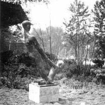 Bundesgartenschau 1957 in Köln - "Spielende Kinder" - Plastik von Gerhard Marcks